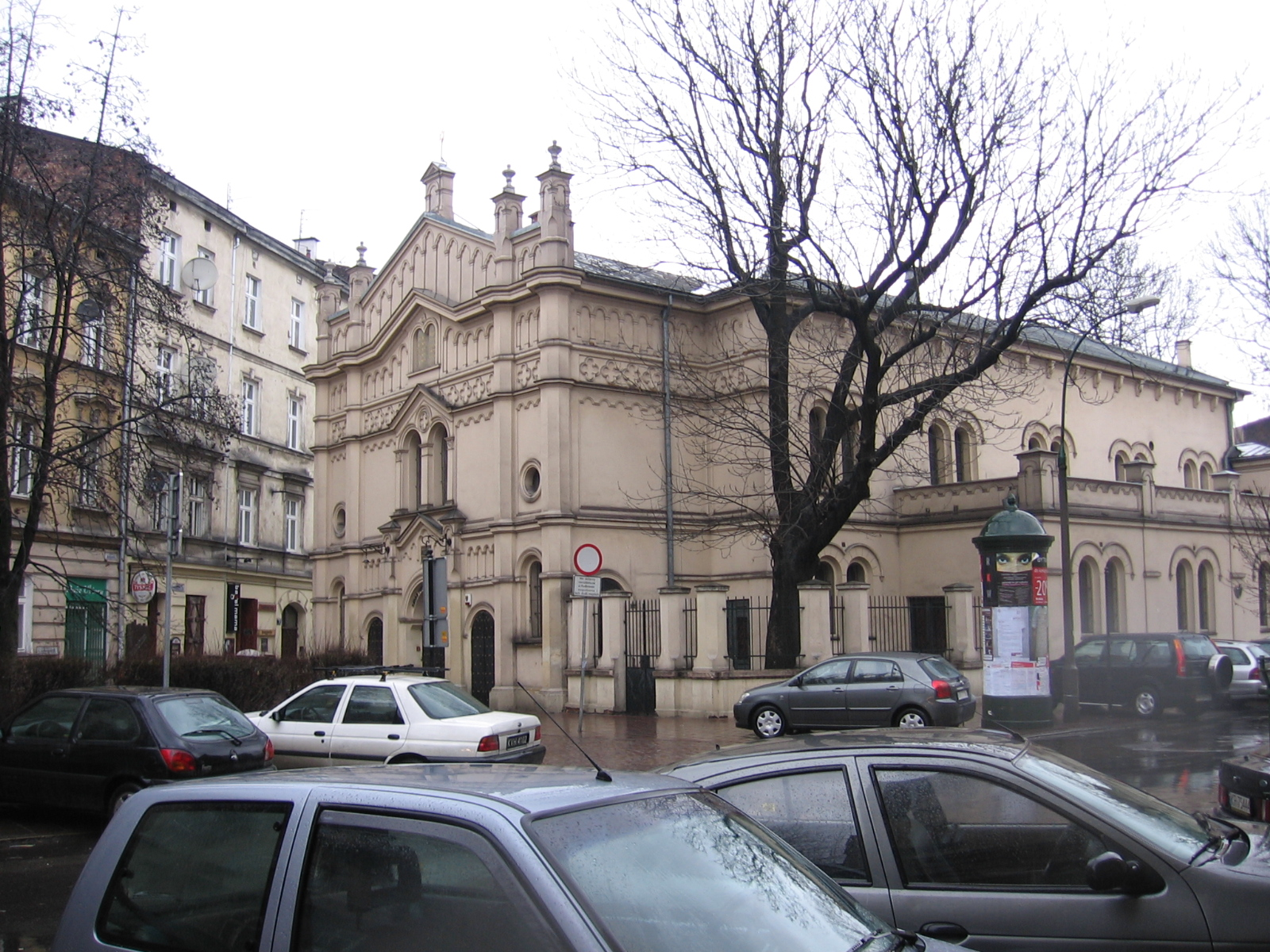 Synagoga Tempel w Krakowie Author: Wikipedysta:Birczanin